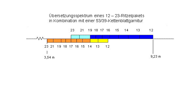 Grafische Veranschaulichung der Ablauflängen verschiedener Übersetzung(Entfaltung mit 26-Zoll Laufrad)